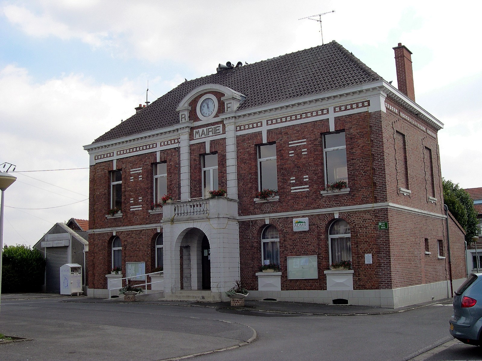 La mairie de la commune de Gouzeaucourt (Nord, Département 59, août 2005)